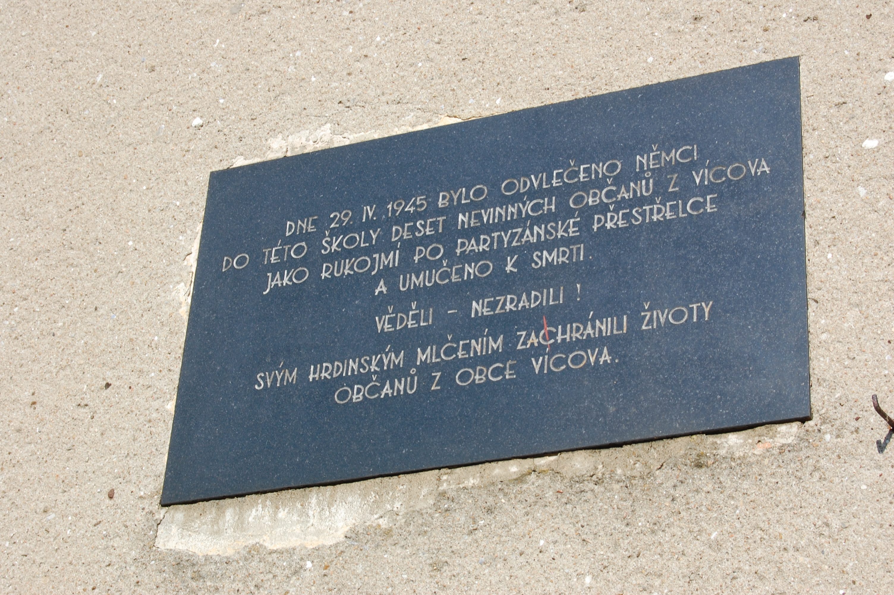 Pamětní deska na školce, Suchý, okres Blansko